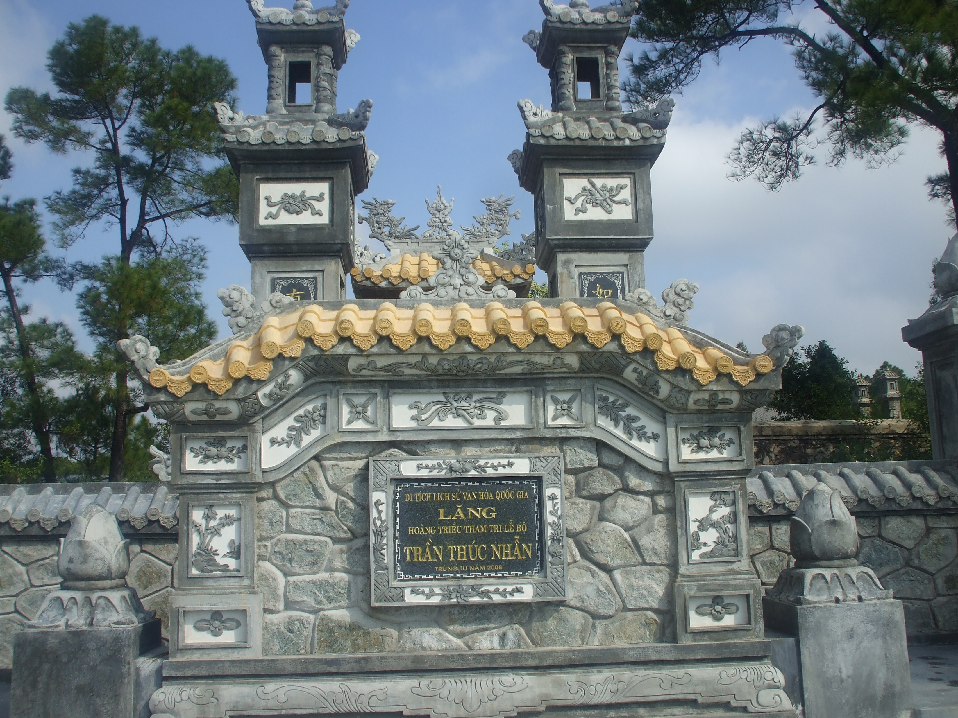 Lăng mộ Trần Thúc Nhẫn ở gần chùa Từ Hiếu, nay thuộc phường Thủy Xuân, thành phố Huế (Việt Nam).